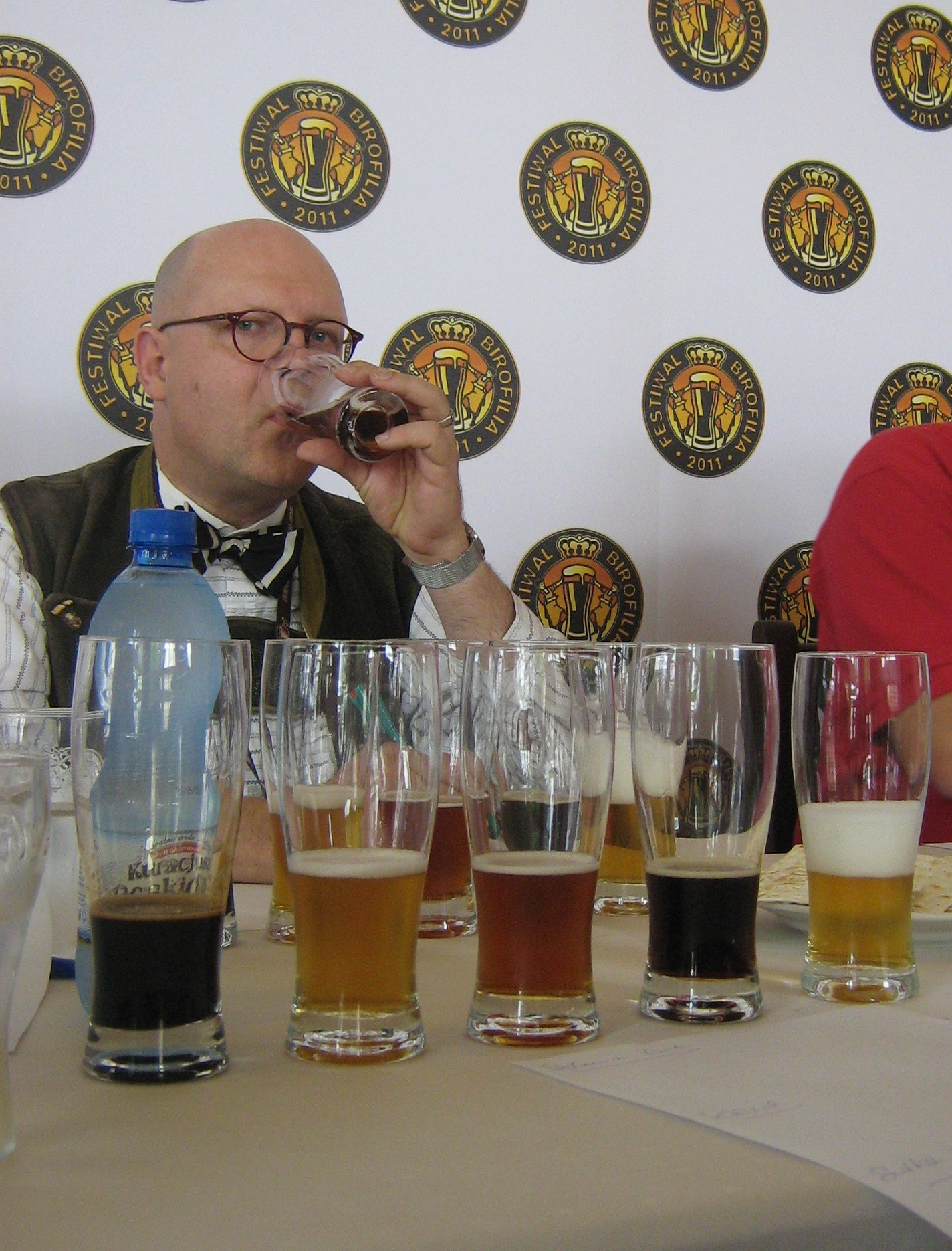 Conrad Seidl czyli Bierpapst jako członek komisji oceniającej piwa domowe